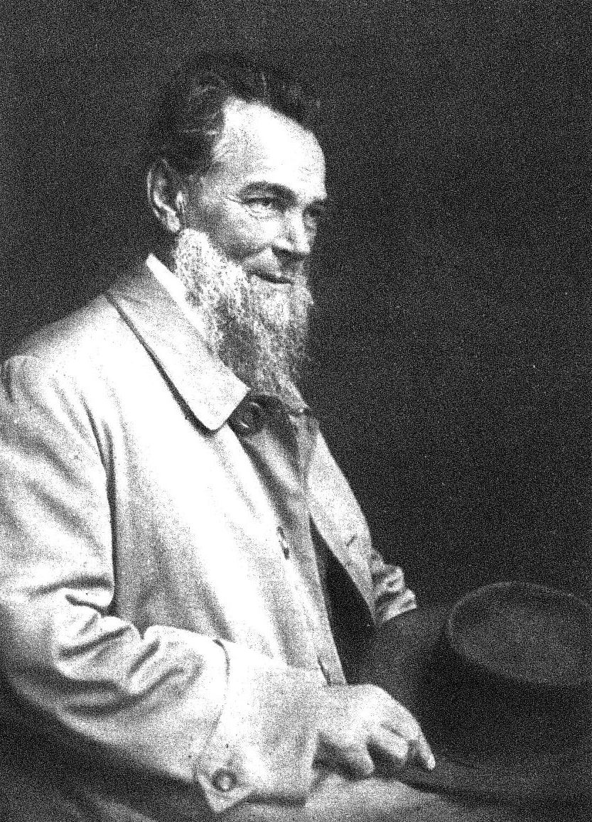 Michael Blümelhuber Michael Blümelhuber (1865–1936), Austrian engraver